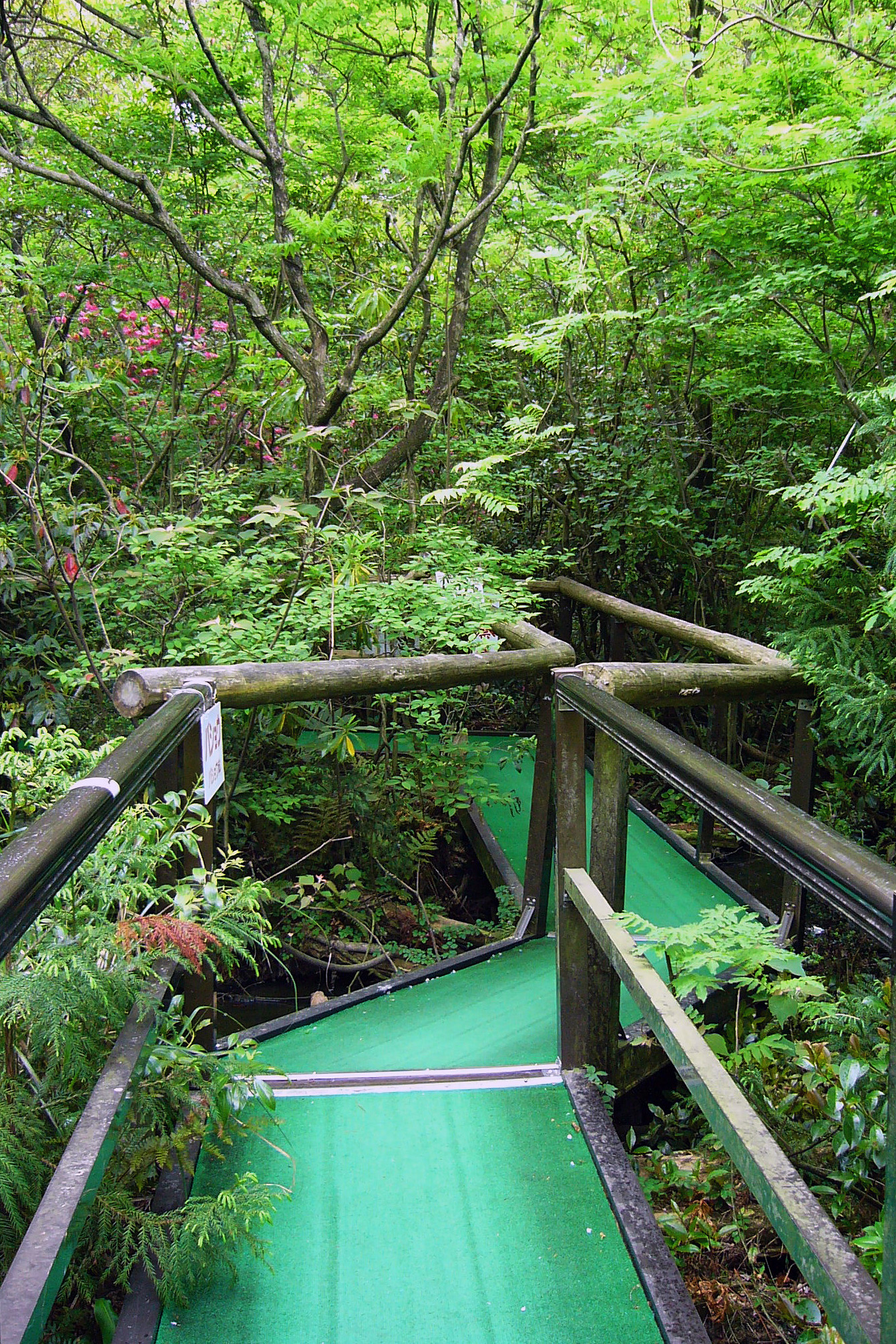 Ukishima-no-mori in Shingu, Wakayama Prefecture